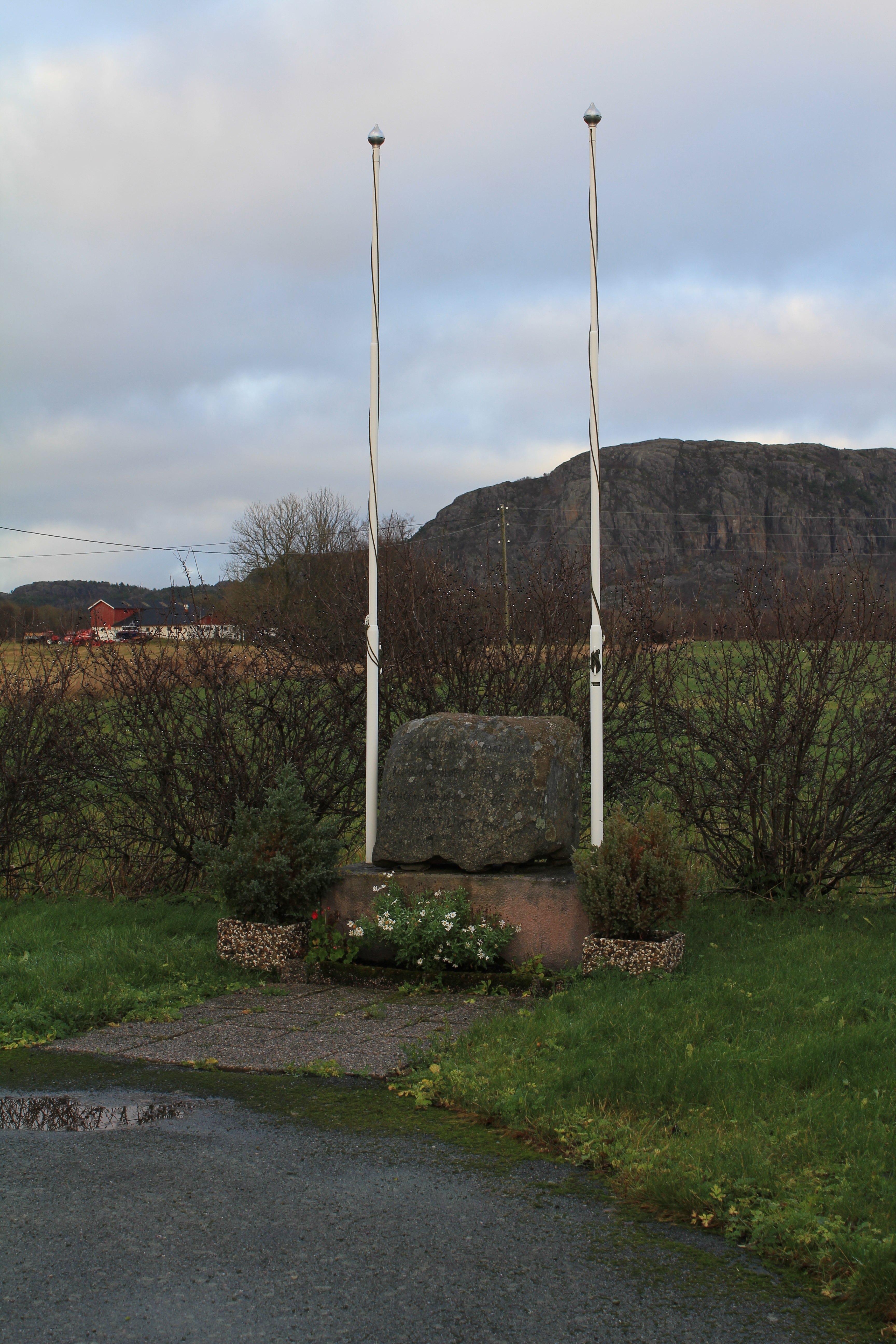 350 Jugoslaviske partisaner ble her holdt i tysk krigsfangenskap 1942-45. 65 av dem mistet livet her.